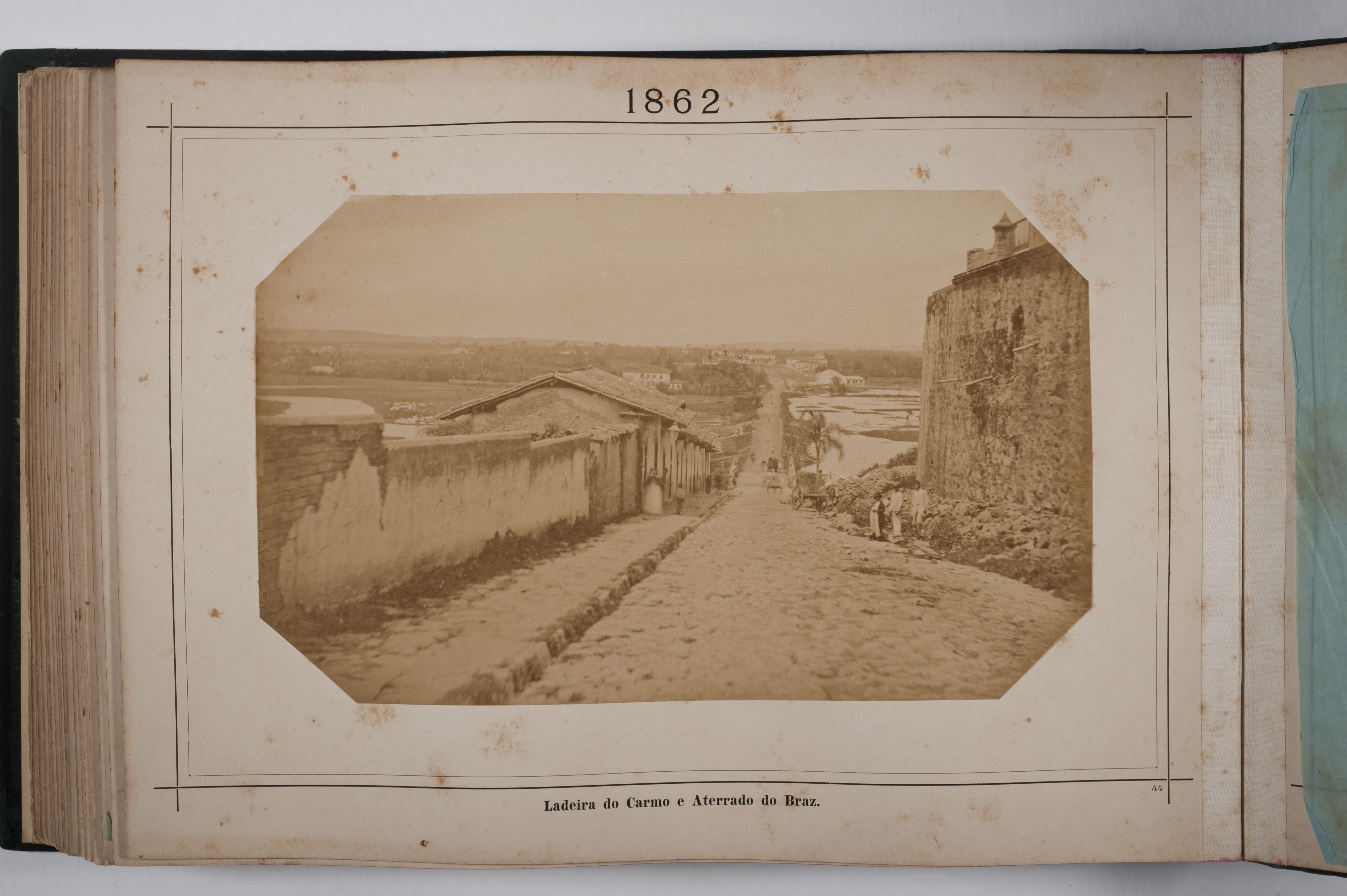 Página 44 do Álbum Comparativo da Cidade de São Paulo. Obra que integra o acervo do Museu Paulista da USP.